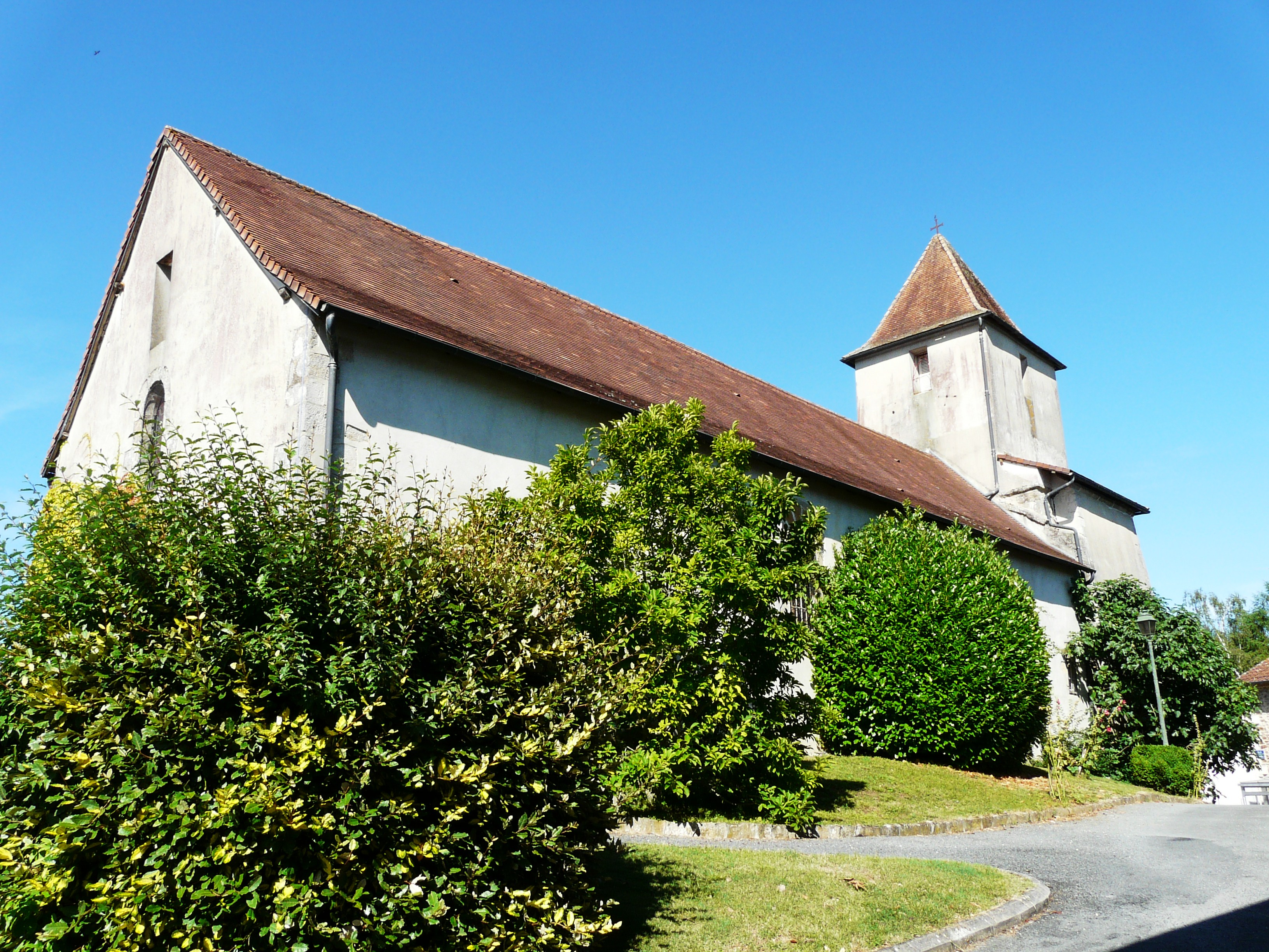 L'église Saint-Georges, Saint-Jory-de-Chalais, Dordogne, France